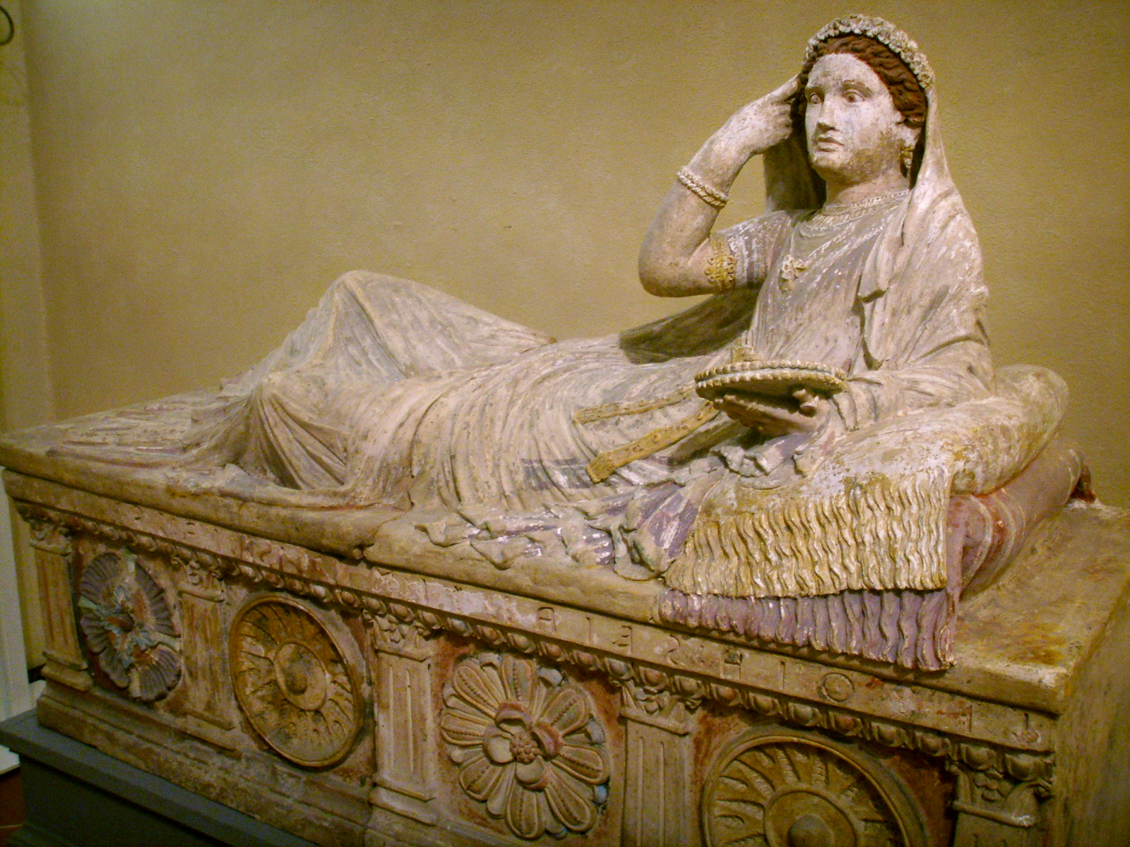 Sarcofago etrusco di Letitia Saeianti. Opera etrusca nel Museo archeologico di Firenze. museum in Florence